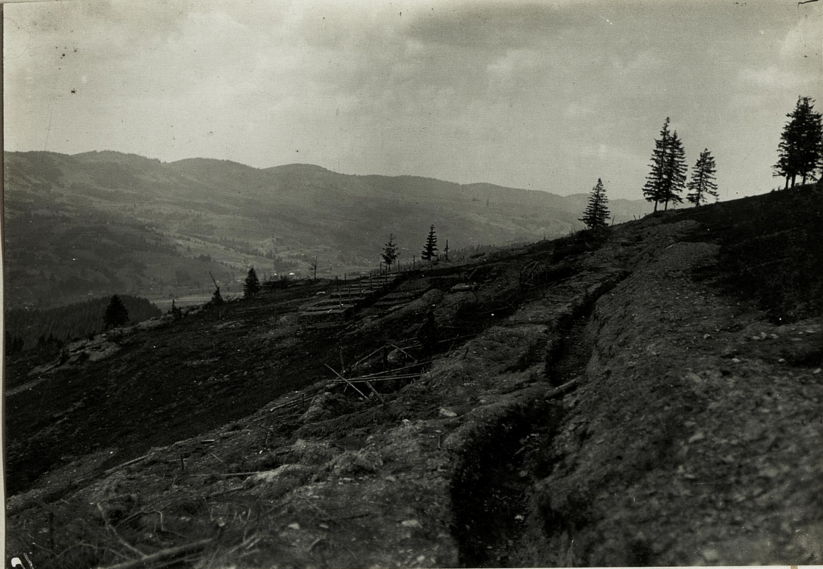 Zwinin.Südhang, Schützengräben im Angriffe